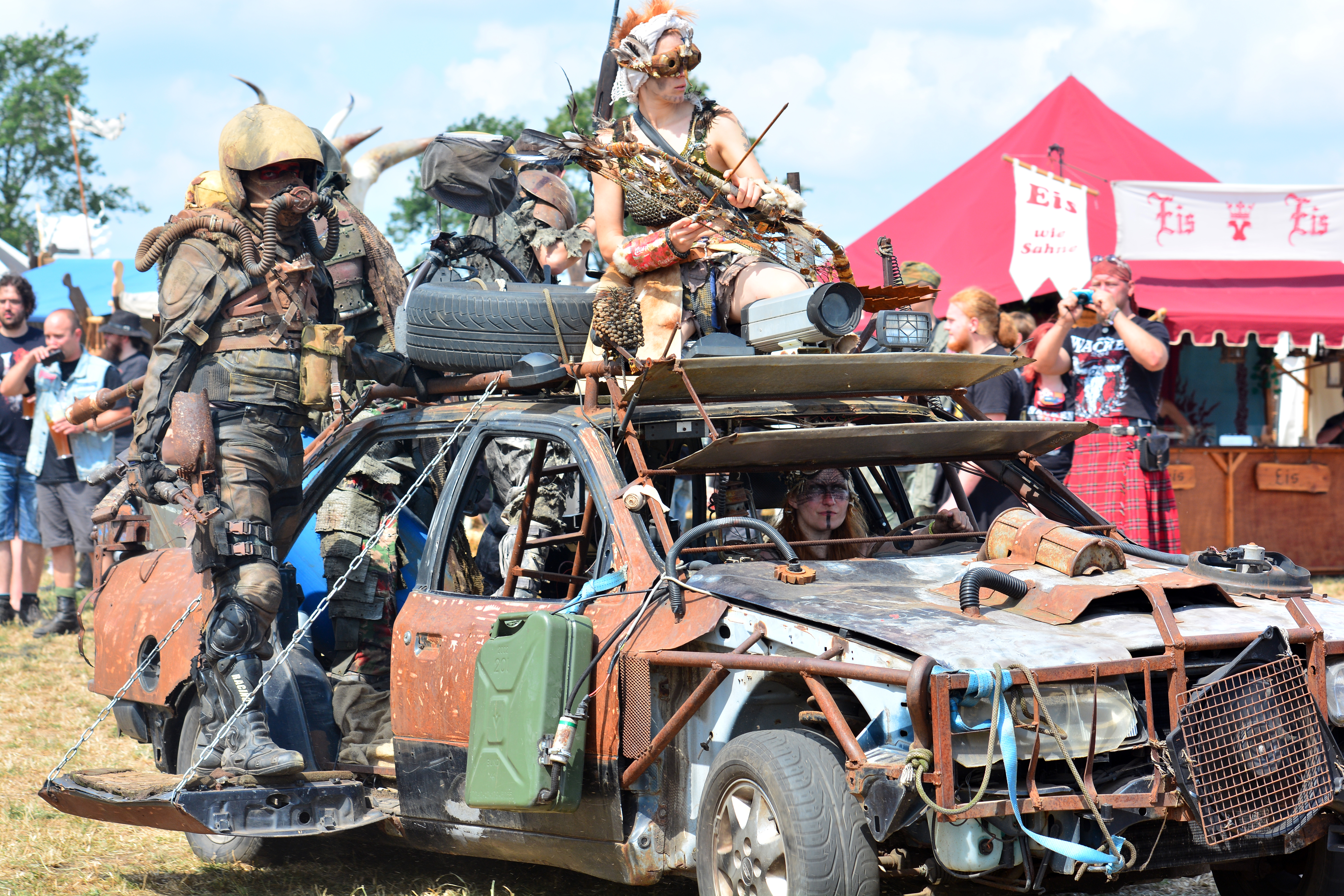 Wastelander beim Wacken Open Air 2014